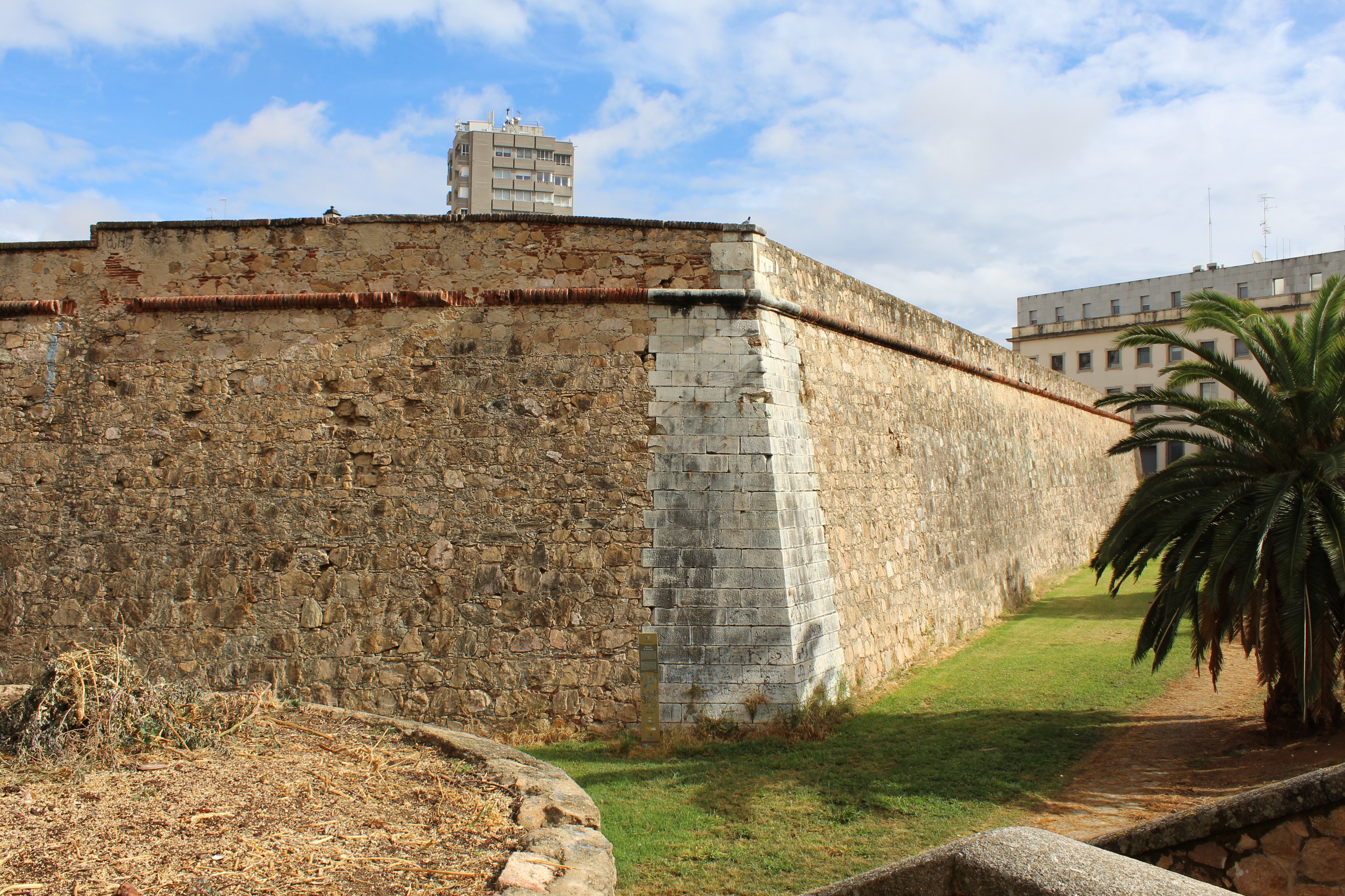 Unión de los lienzos sur y oeste.